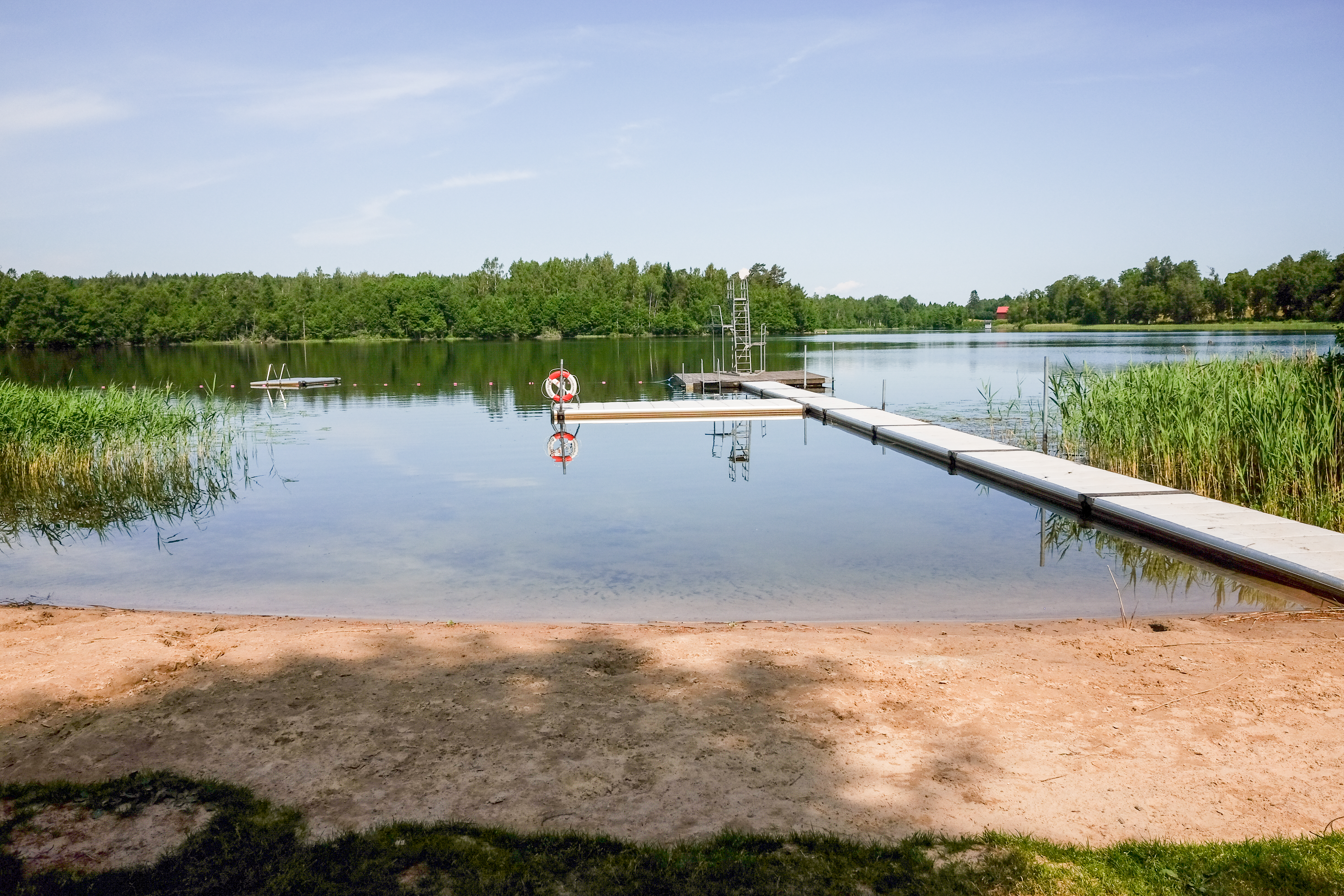 Badplats vid Veden (Veen) nära Svinnersta.